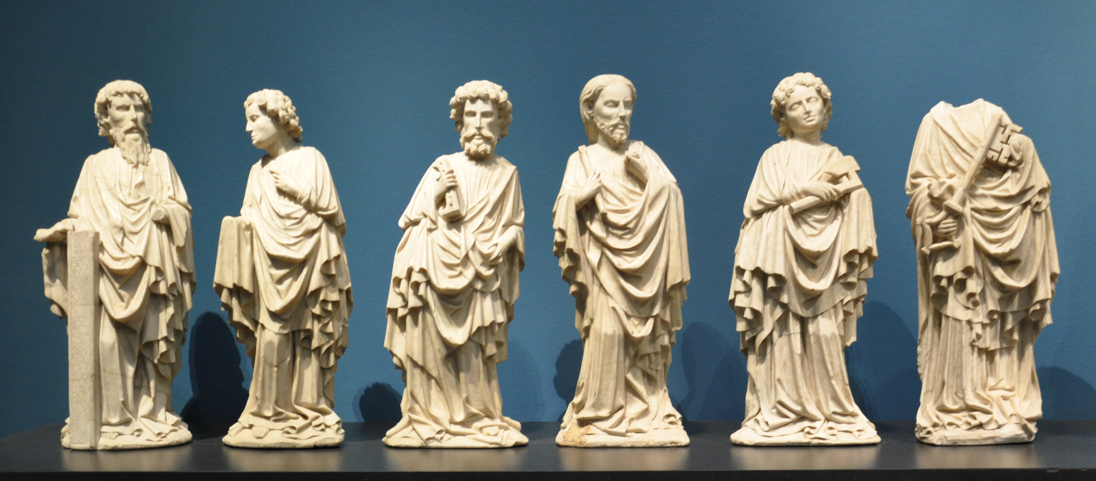 Meister des Rimini-Altars: Kreuzigungsaltar aus Rimini (Rimini-Altar); Südniederlande oder Nordfrankreich, um 1430; Alabaster, geringe Reste alter Fassung Liebieghaus, Frankfurt am Main, Inv. Nr. 400–418; Weblink